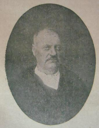 Чавдар Чавдаров.